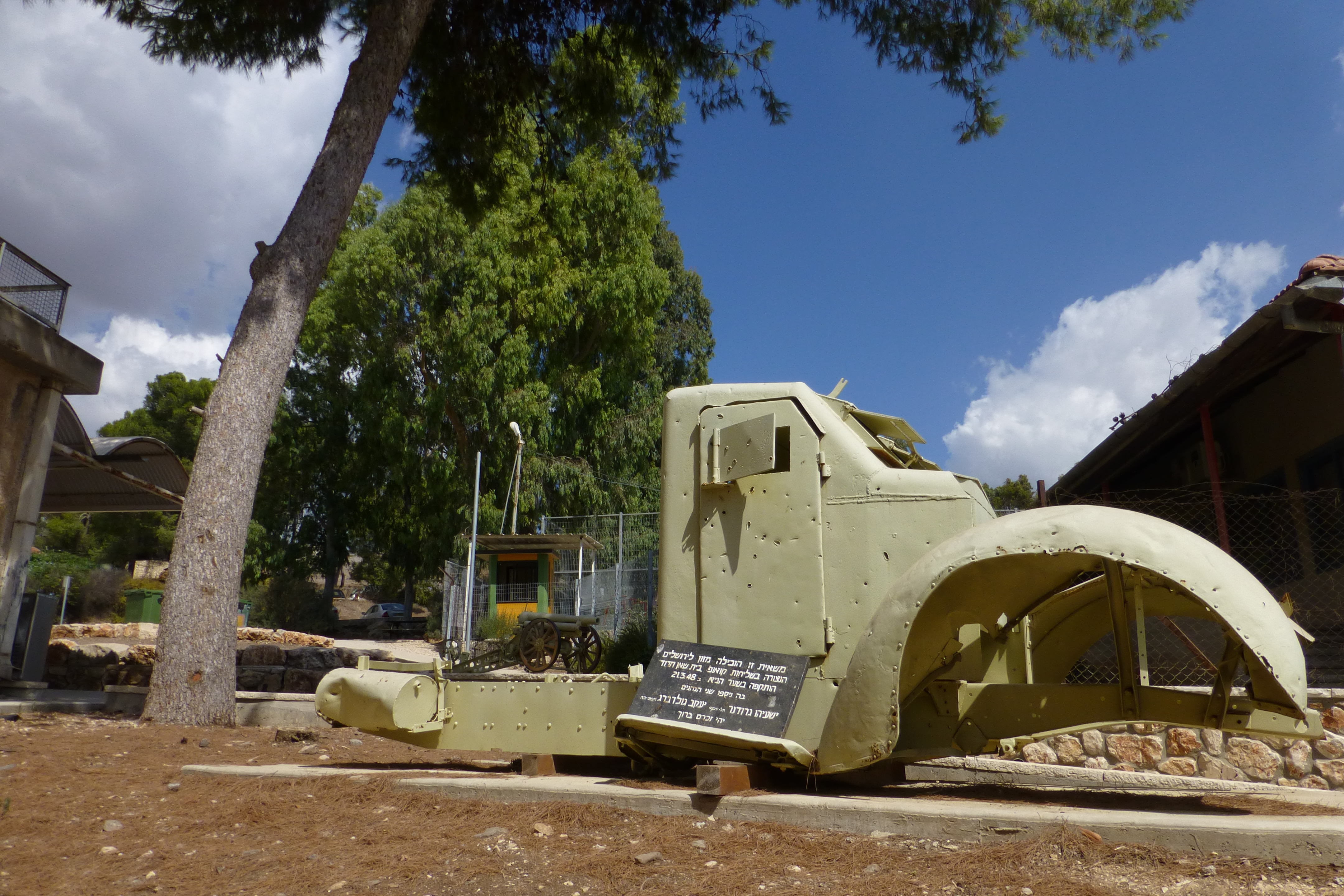 מוזיאון בית שטורמן המצוי בקיבוץ עין חרוד מאוחד נוסד בשנת 1941 על ידי חבר הקיבוץ שמואל סבוראי כמוזיאון לטבע.